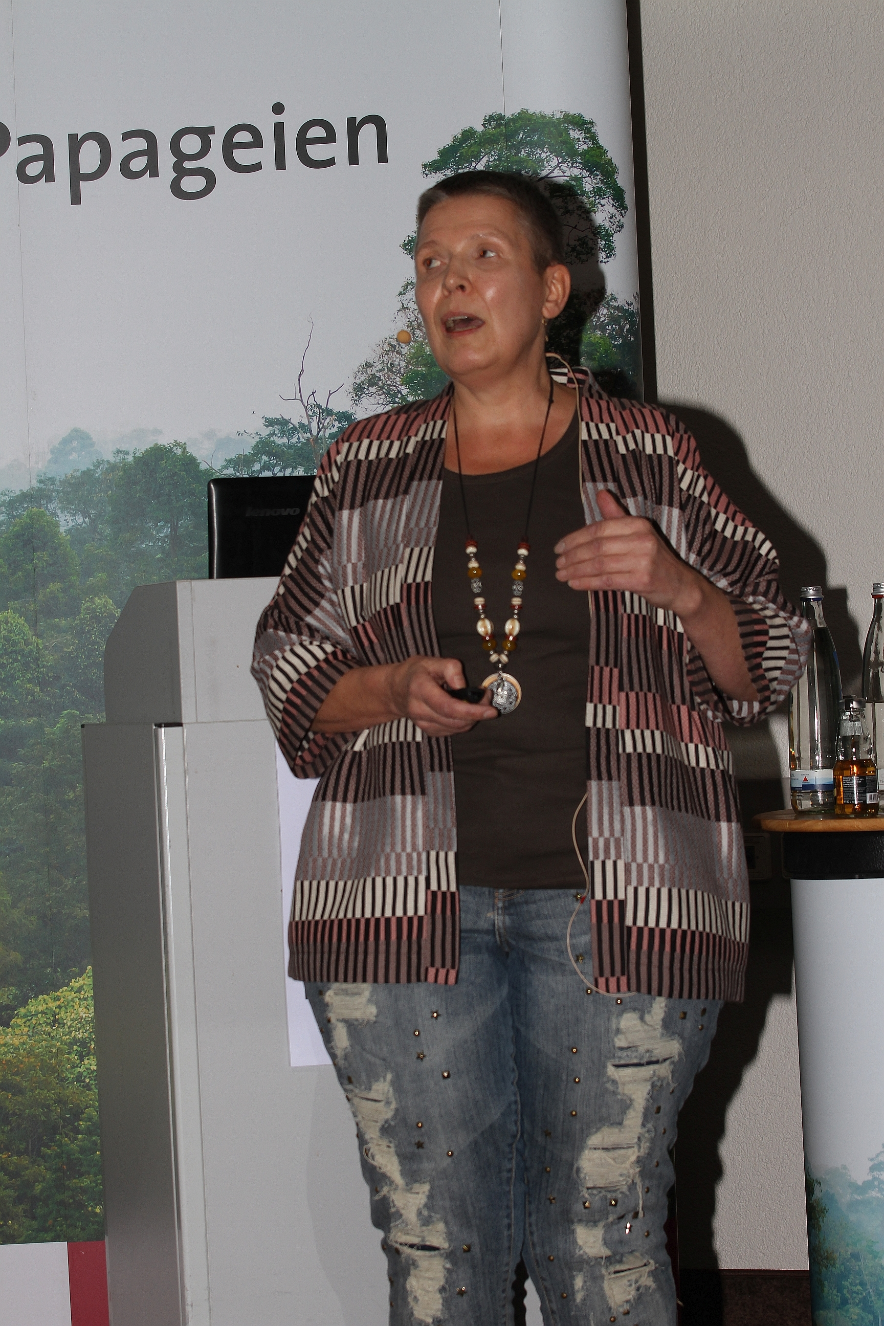 Hilldegard Niemann